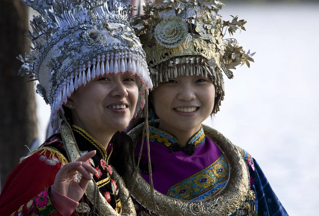 China